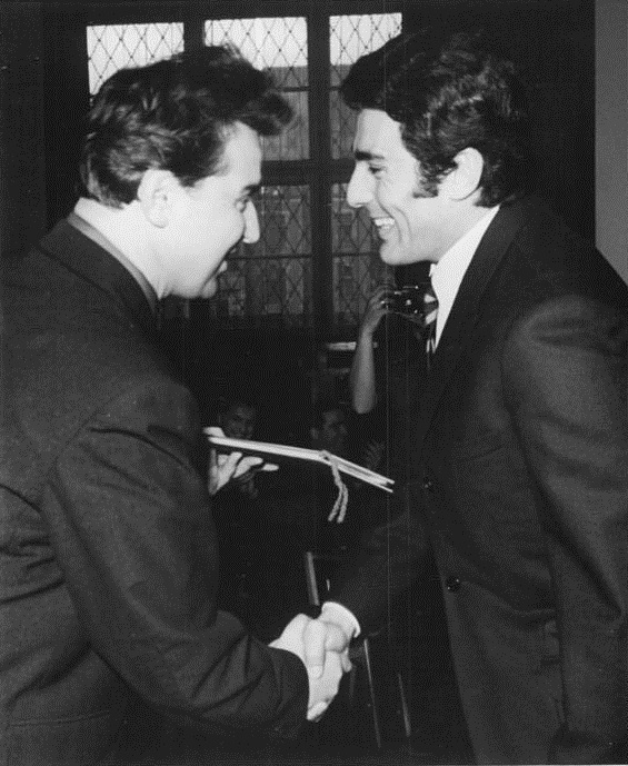 Berlin, Erich-Weinert-Medaille an Gojko Mitic Zentralbild Franke 6.3.69 Berlin: Kunstpreis der FDJ verliehen Während einer Veranstaltung des Zentralrates der FDJ am 6.3.1969 wurde an verdienstvolle Persönlichkeiten und Künstler die Artur-Becker-Medaille und der Kunstpreis der FDJ, die Erich-Weinert-Medaille, verliehen. Für seine überzeugende künstlerische Darstellung des Haupthelden in den Filmen "Chingackgock, die große Schlange", "Die Söhne der großen Bärin" und "Spur des Falken" wurde dem Schauspieler Gojko Mitic der Kunstpreis der FDJ, die Erich-Weinert-Medaille verliehen. Die Auszeichnung nahm der 1 .Sekretär des Zentralrates der FDJ, Günter Jahn (l.)vor. Abgebildete Personen: Mitic, Gojko: Schauspieler, Jugoslawien (PND 118582798) Jahn, Günther Dr.: 1. Sekretär der Bezirksleitung Potsdam der SED, DDR